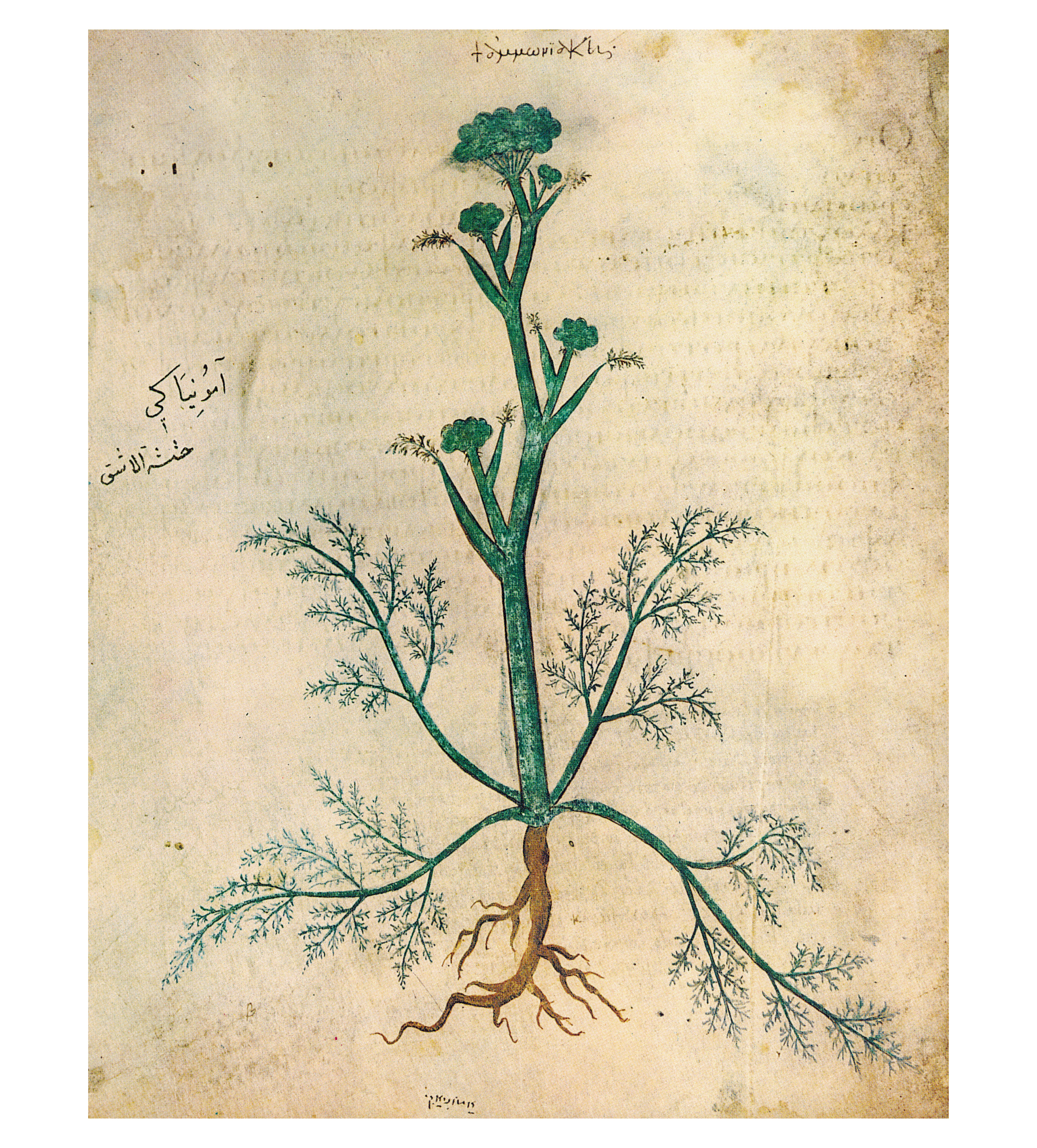 Abbildung der Pflanze Ammoniake